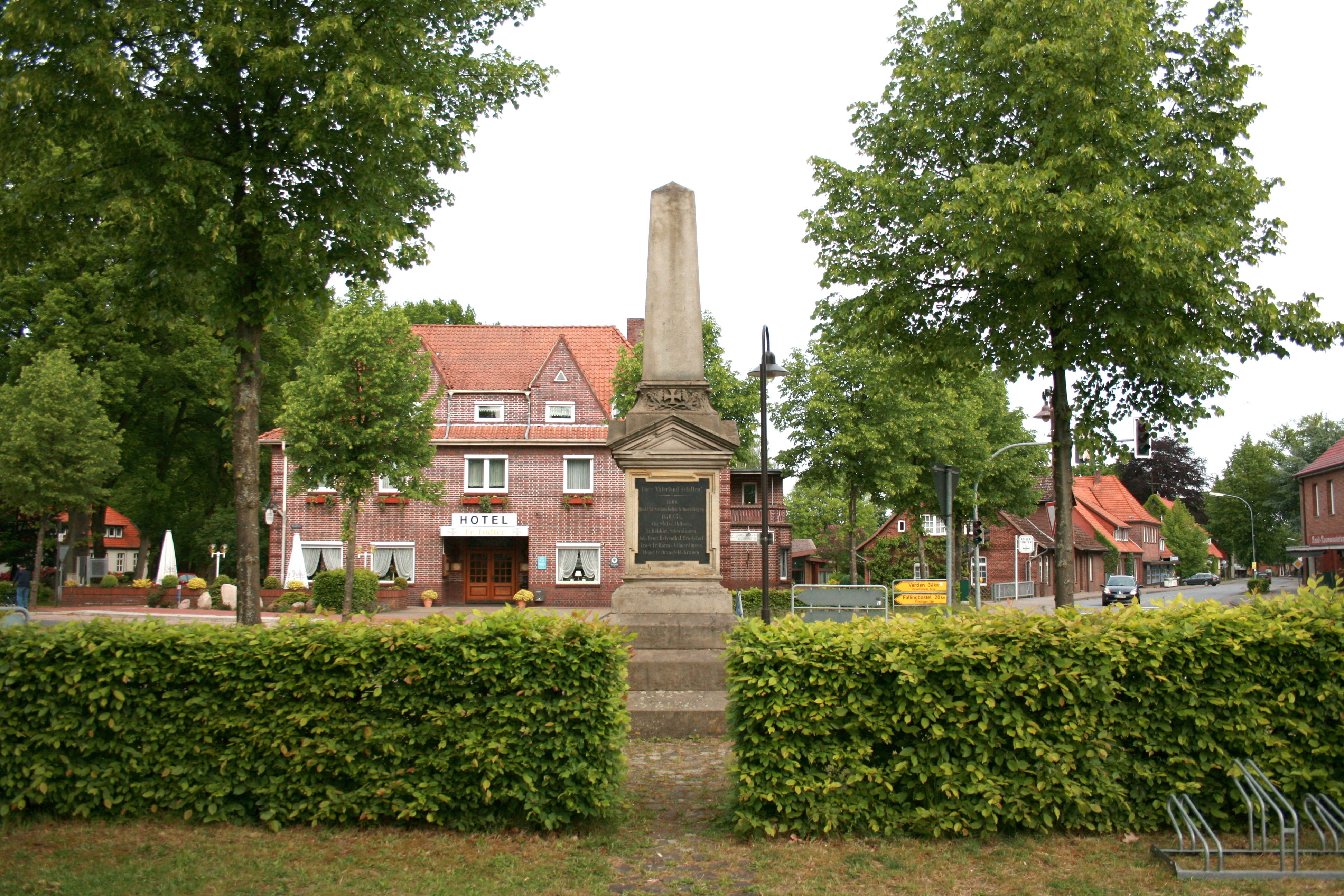 Ecke Hauptstraße / Soltauer Straße in Neuenkirchen (Lüneburger Heide)